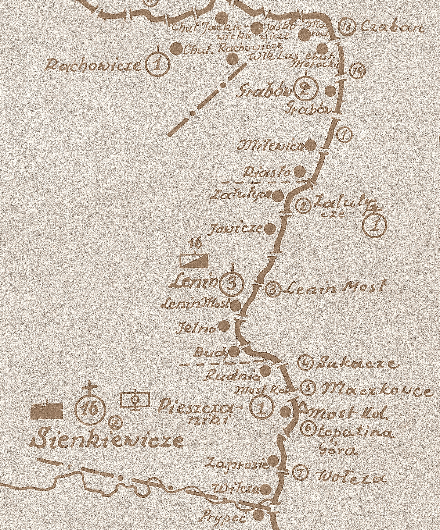 Szkic rozmieszczenia batalionu KOP Sienkiewicze w 1931